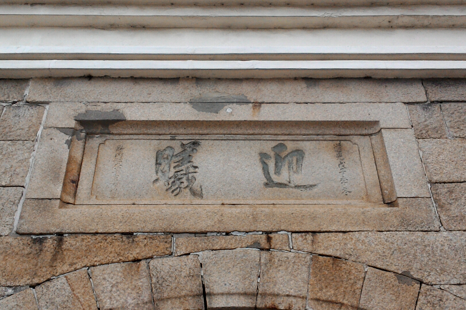 竹塹城迎曦門匾額（道光戊子季冬），新竹市東區東門聯里中正里